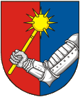 znak obce